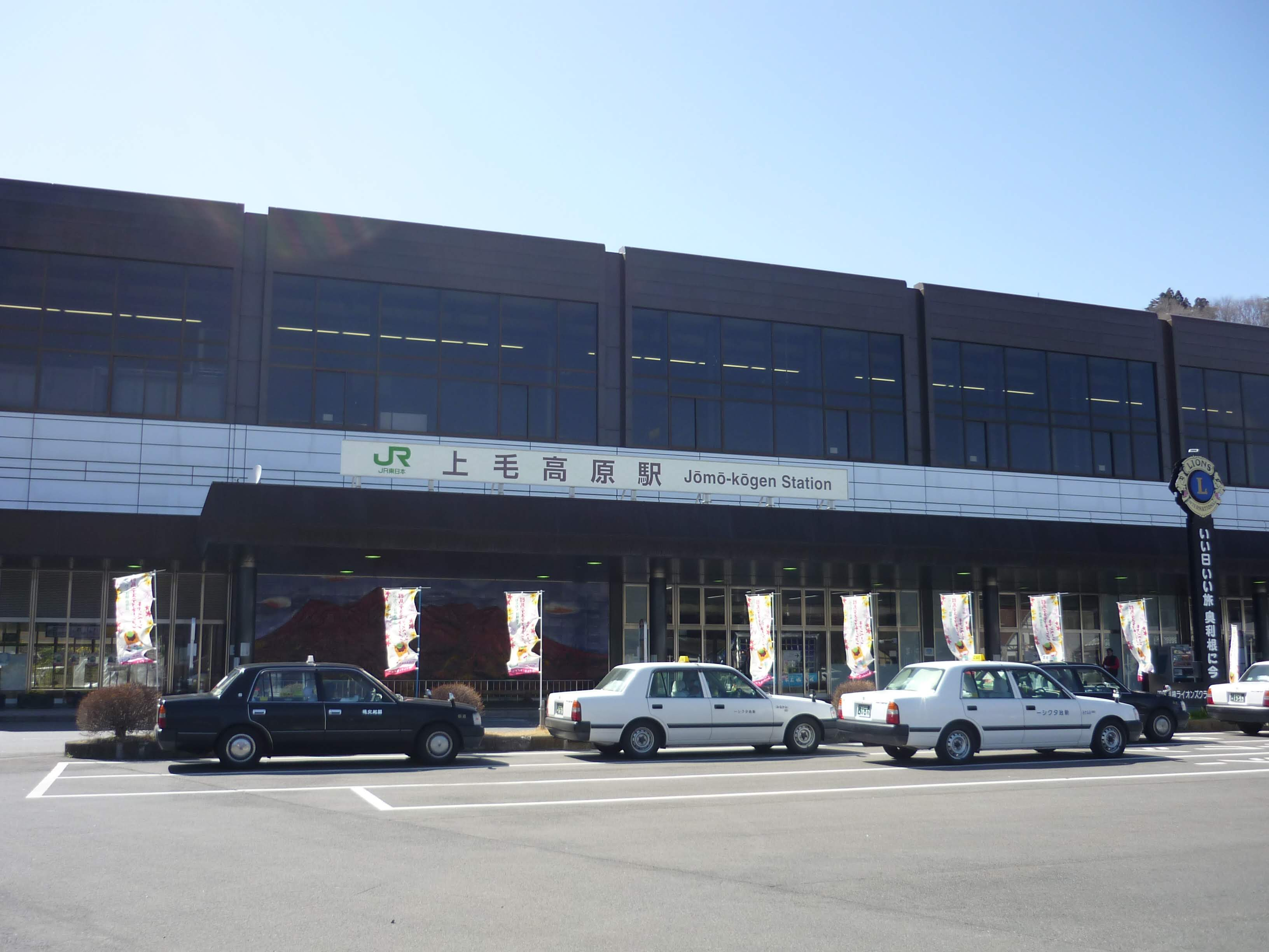 上毛高原駅